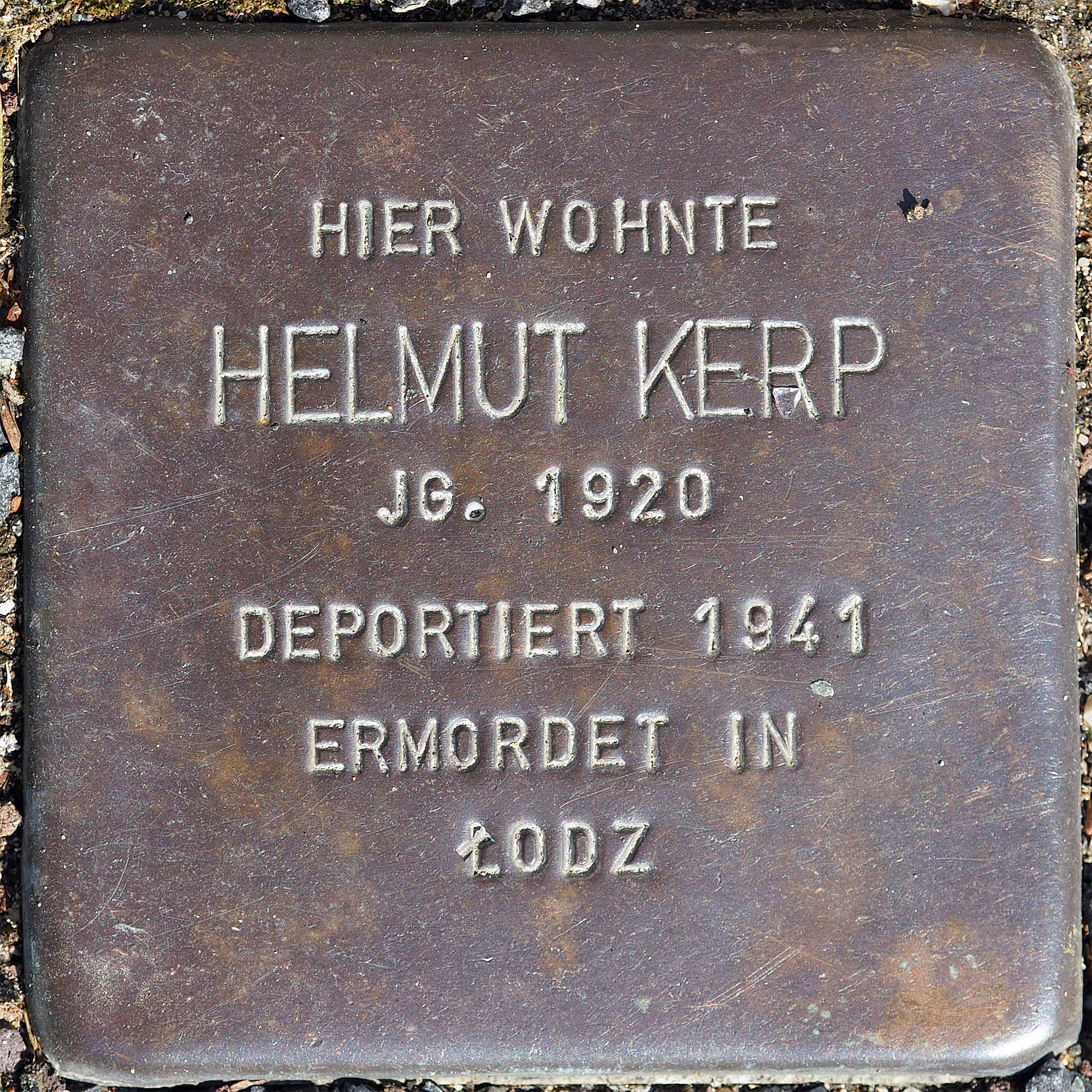 Stolpersteine MG: Kerp, Helmut